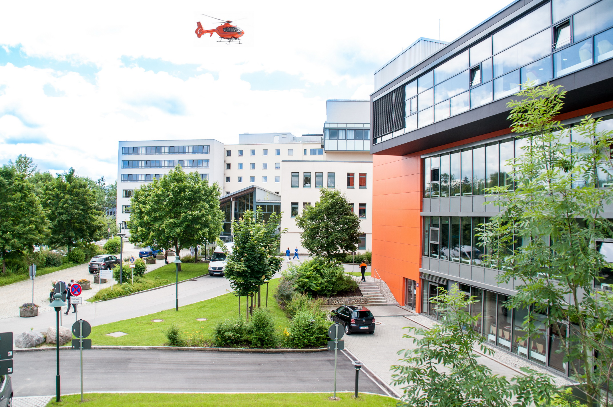 Haupteingang Klinikum Traunstein